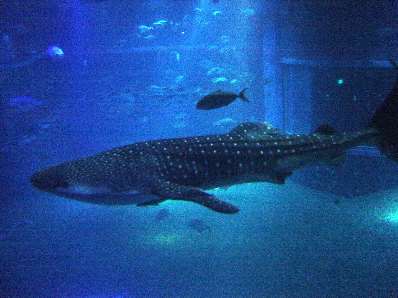 Whale shark at Osaka Aquarium